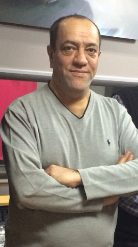 کریم قربانی (استودیو موسیقی سورینت ۲ بهمن ۱۳۹۳)